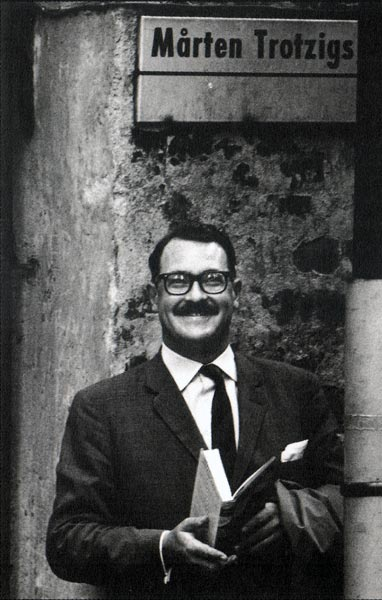 Pär Rådström